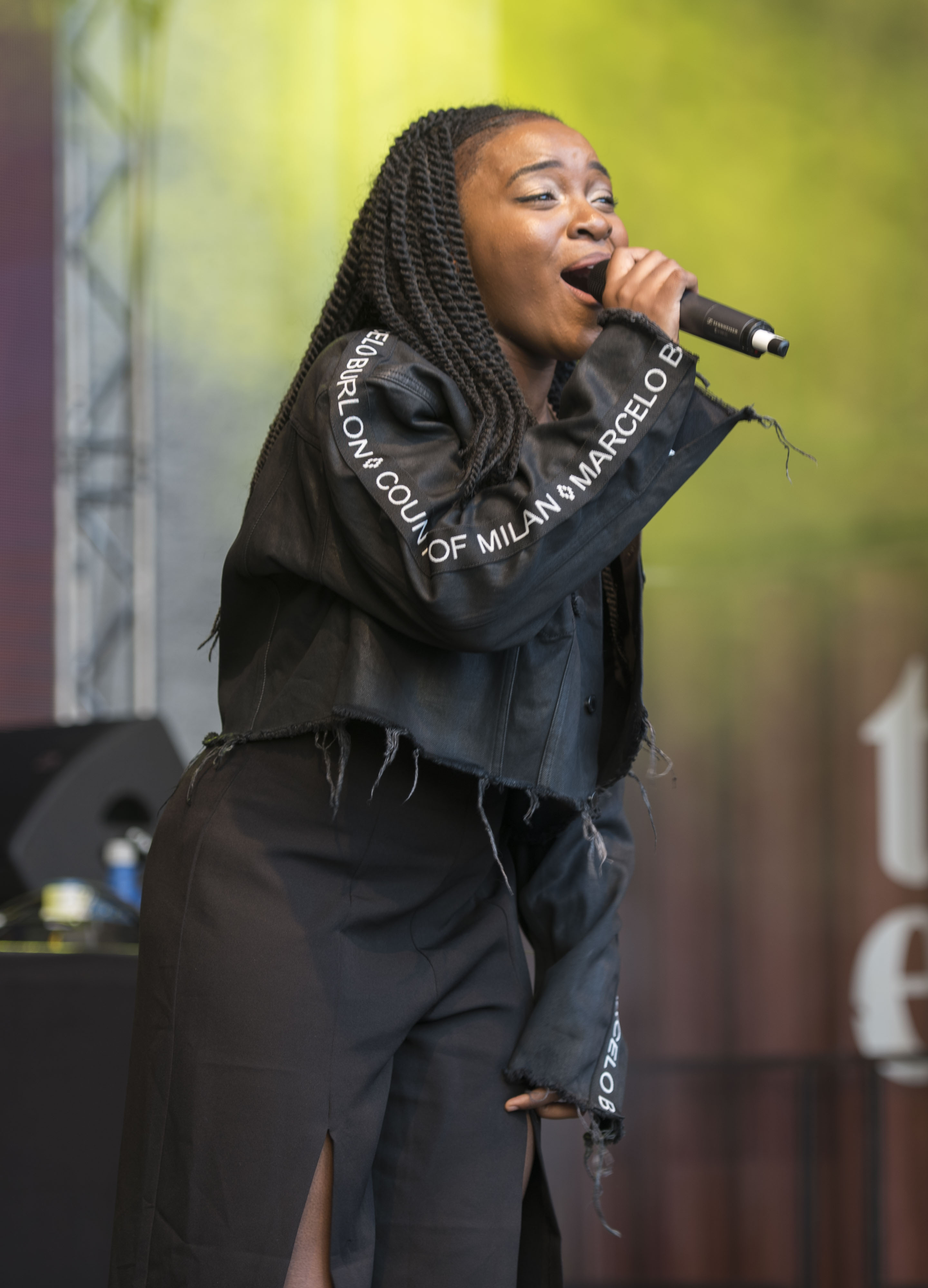 Die britische Rapperin RAY BLK beim splash! Festival 20 (2017).